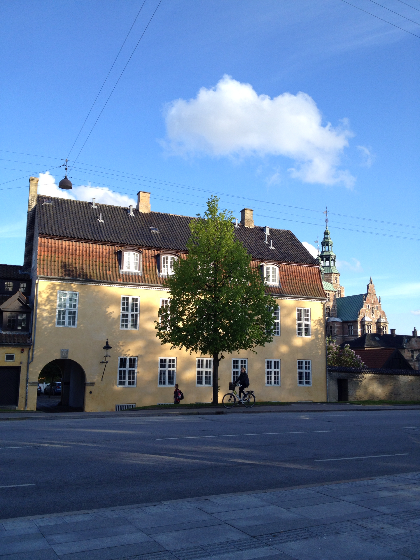 Slotsforvalterboligen at Øster Voldgade 4B in Copenhagen, Denmark